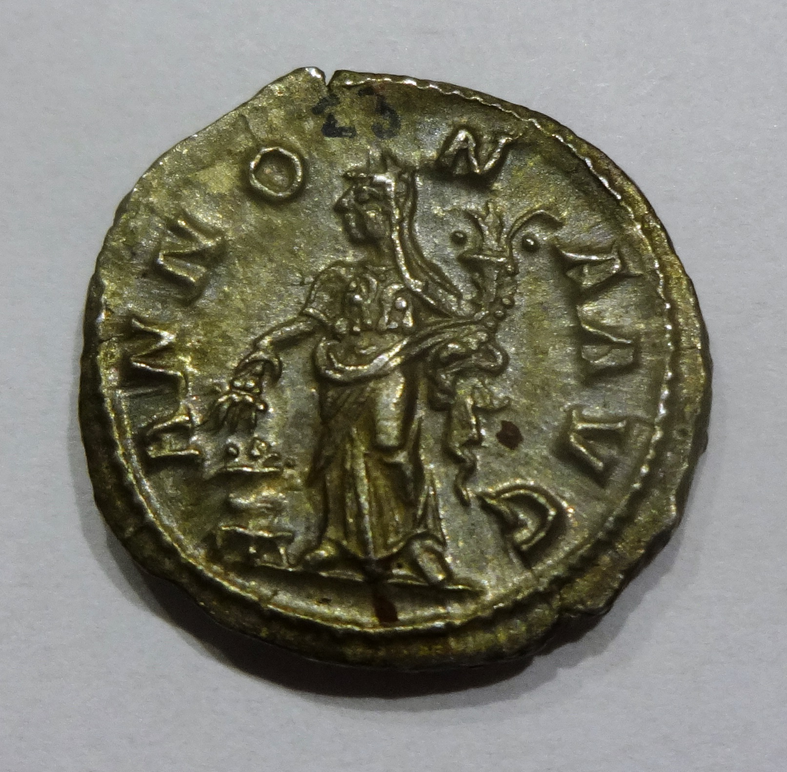 Annona mit Füllhorn auf Rückseite Denar von Alexander Severus